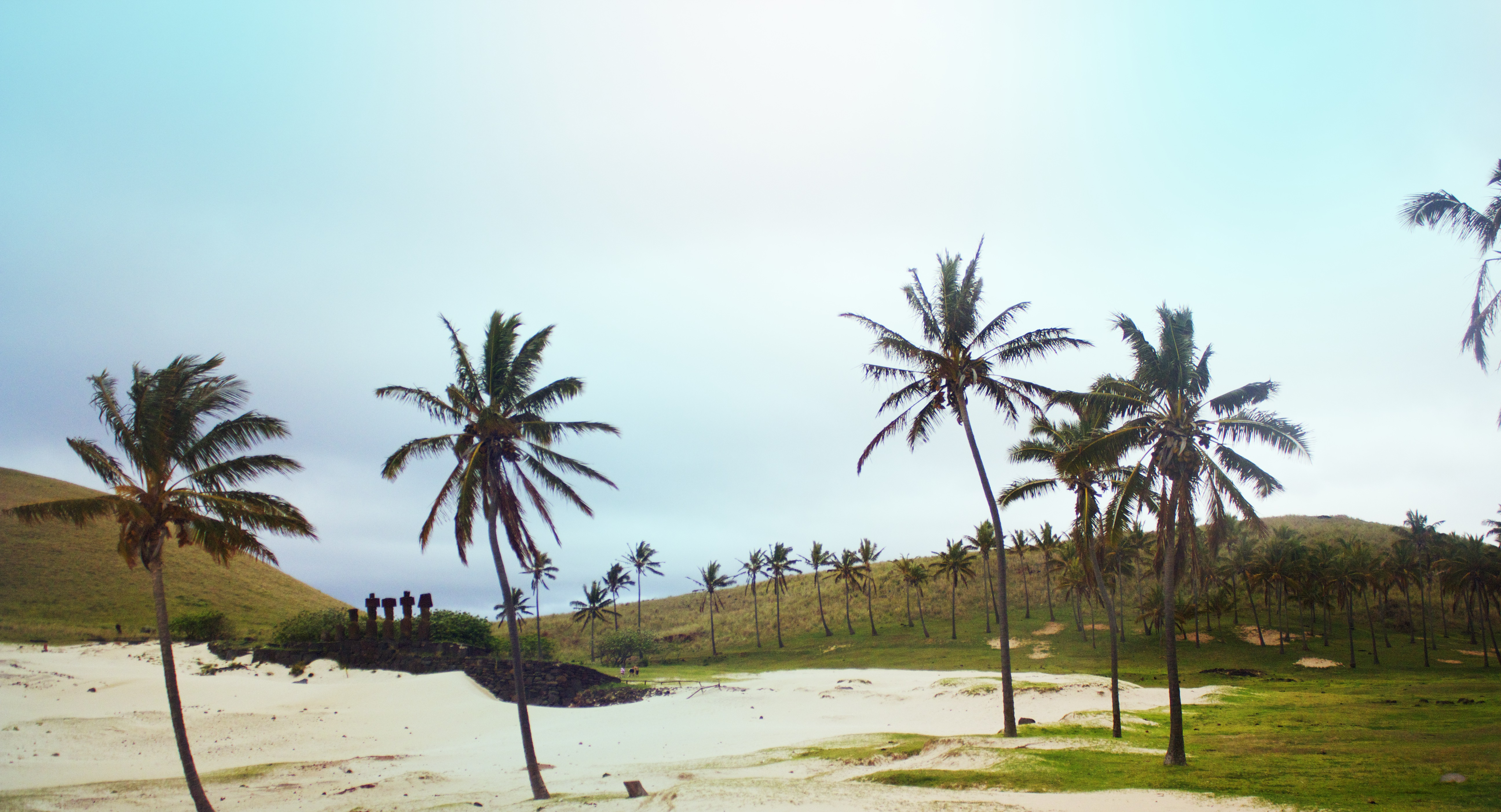 Isla de Pascua This is a photo of a national monument in Chile: 628